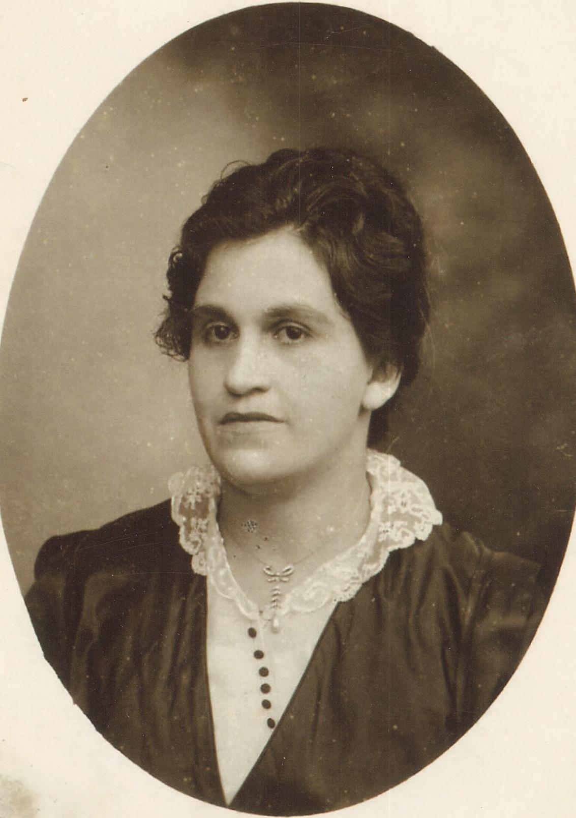 Pessoa trajando casco preto com blusa branca